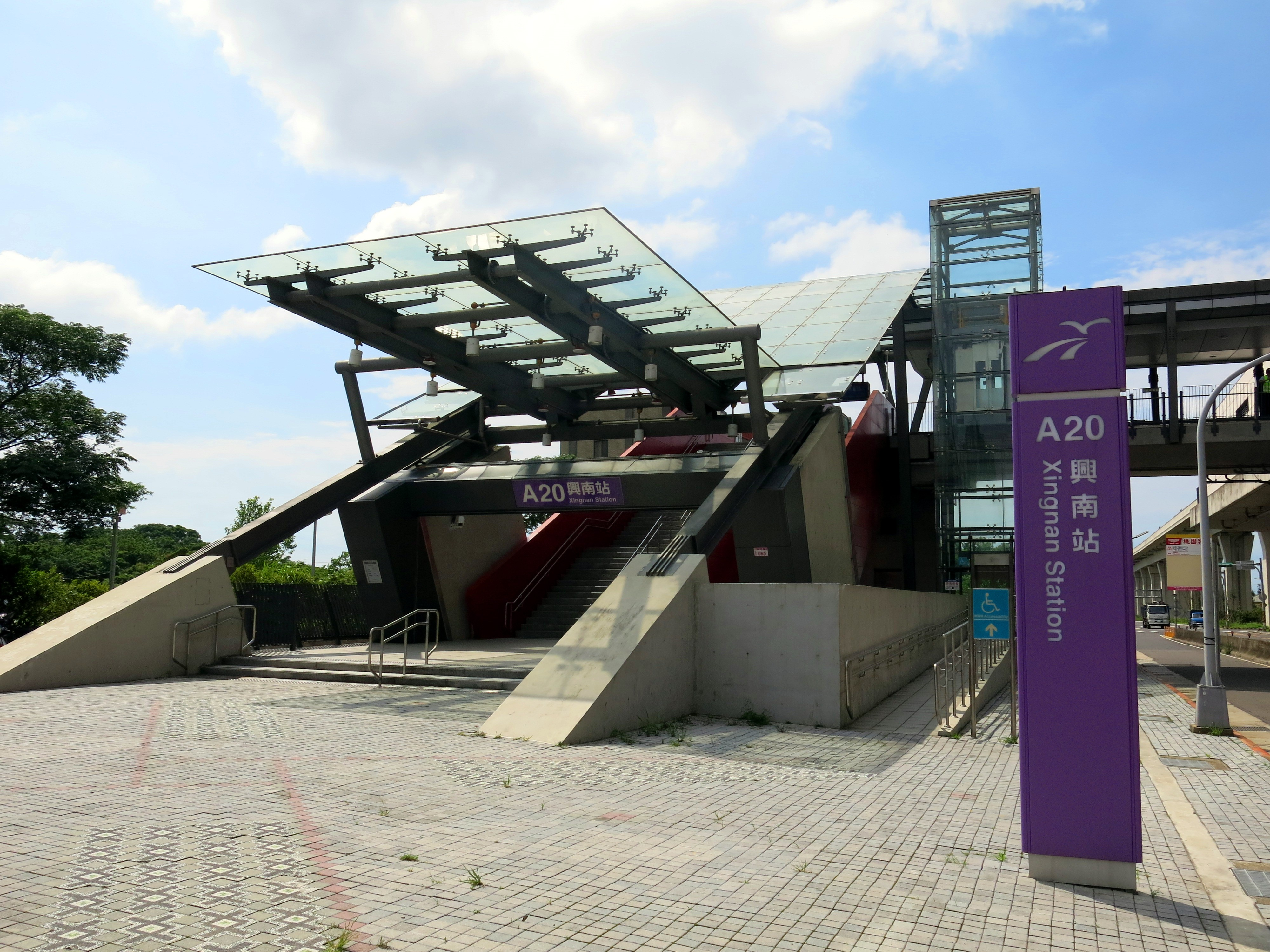 中文（台灣）: 桃園捷運機場線A20興南站